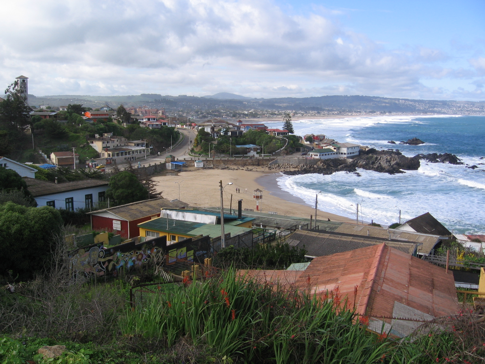 Las Cruces, V Región de Valparaíso, Playa Chica (Small Beach)